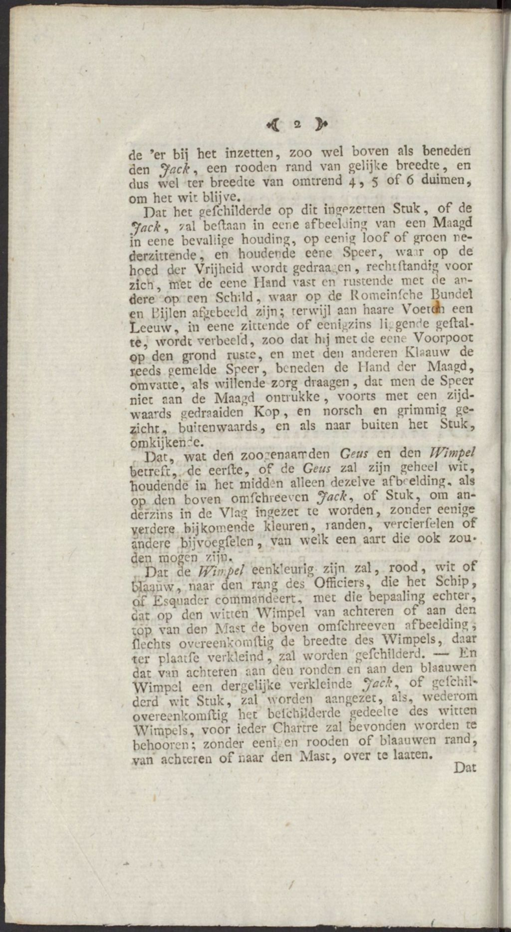 Publicatie der Staaten Generaal, bij welke de nationaale vlag van deezen staat voor het vervolg bepaald wordt. Geärresteerd den 14. februarij 1796. Herkomst: Den Haag, Koninklijke Bibliotheek Signatuur: 198 F 1:3:36